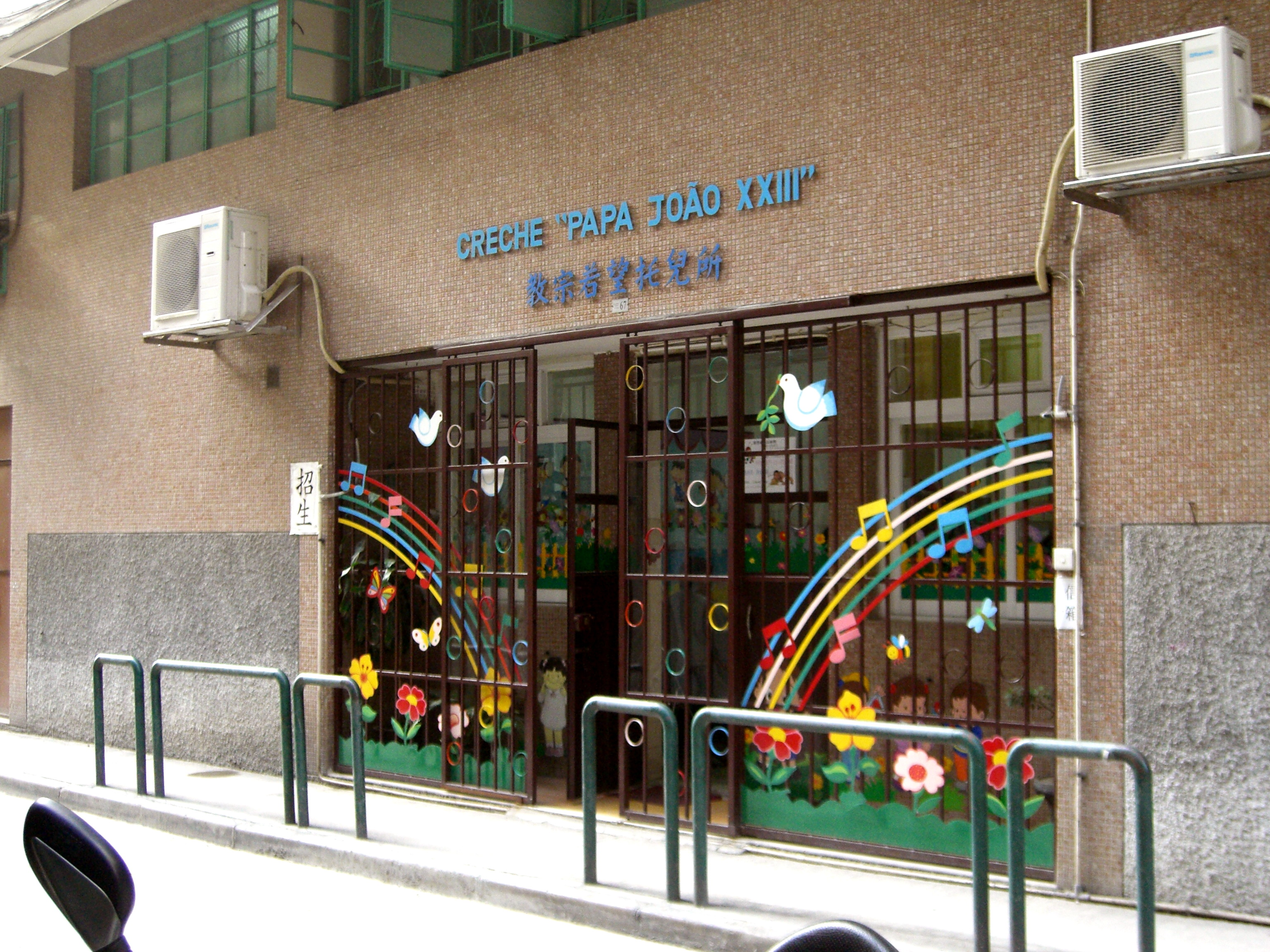 Creche "Papa João XXIII"